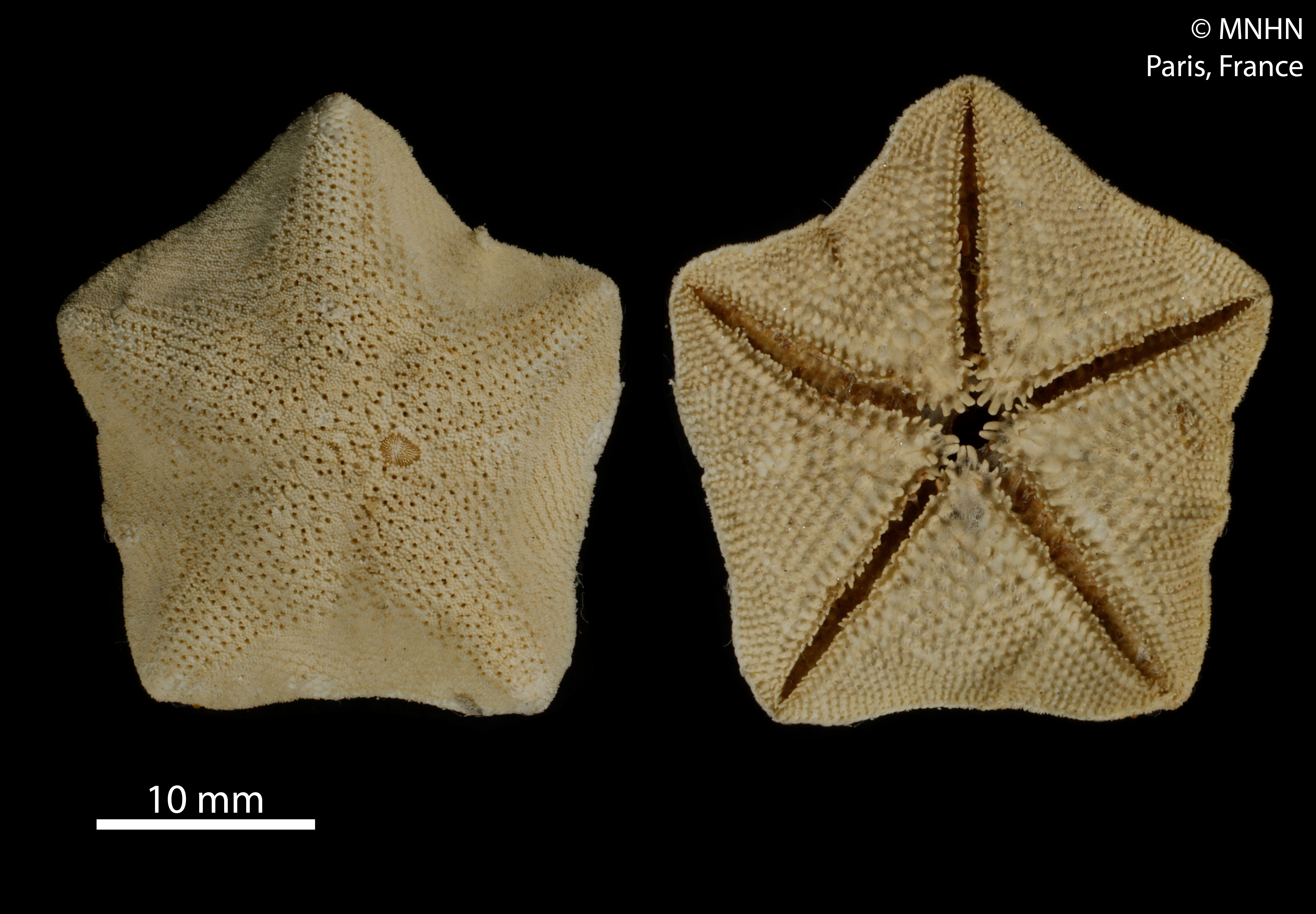 Cryptasterina pentagonaSpécimen MNHN-IE-2014-485Collection : Échinodermes (IE)Muséum National d'Histoire Naturelle (Paris, France) Origine : Libellé du pays : PHILIPPINES